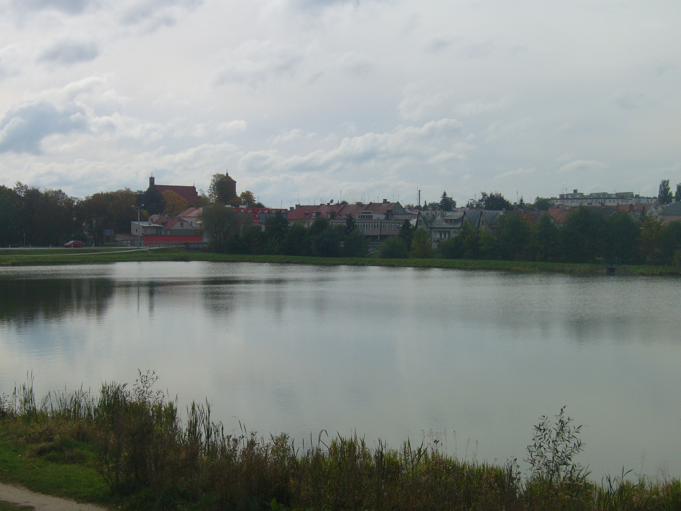 zalew w Makowie Mazowieckim